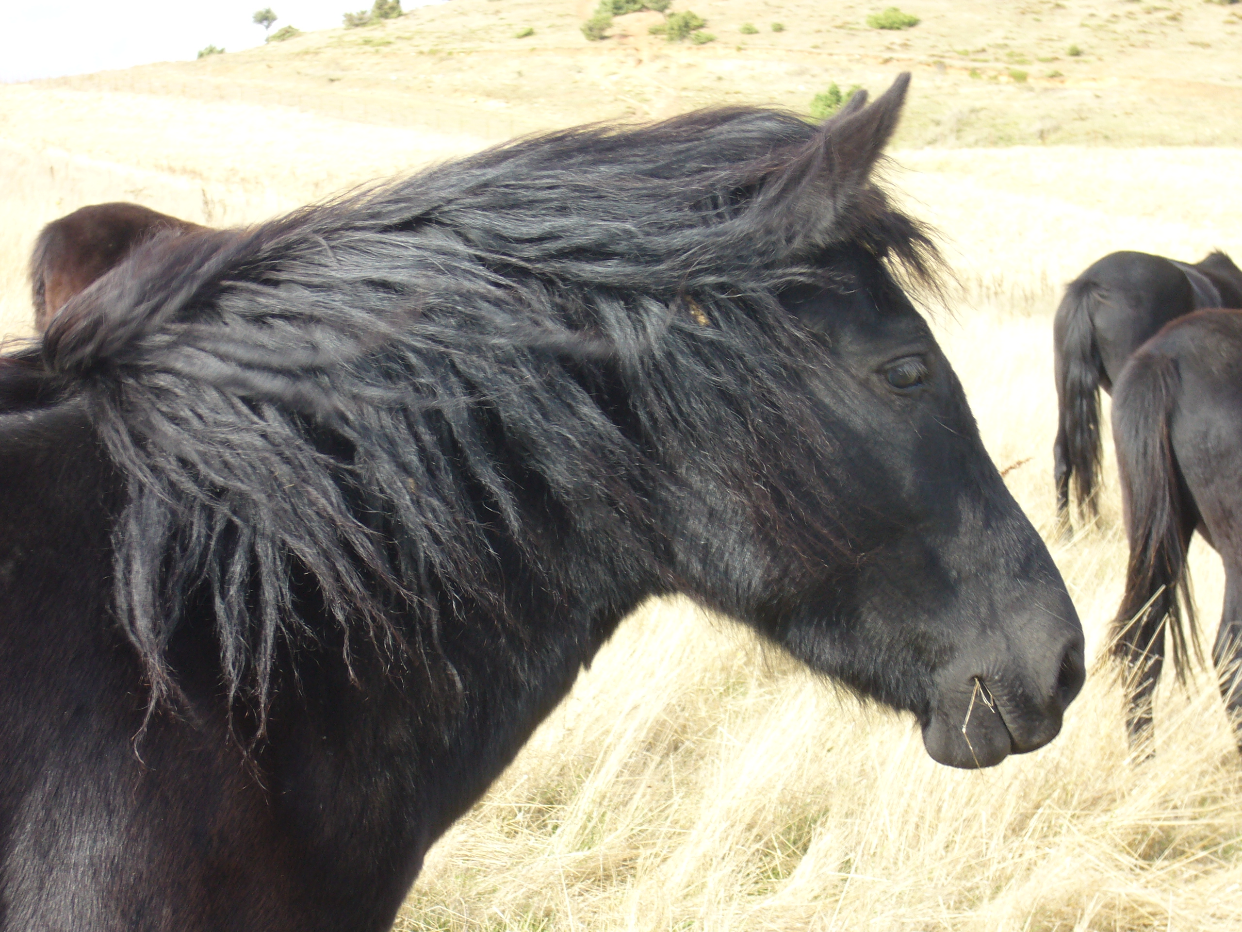 Zaldi baten burua